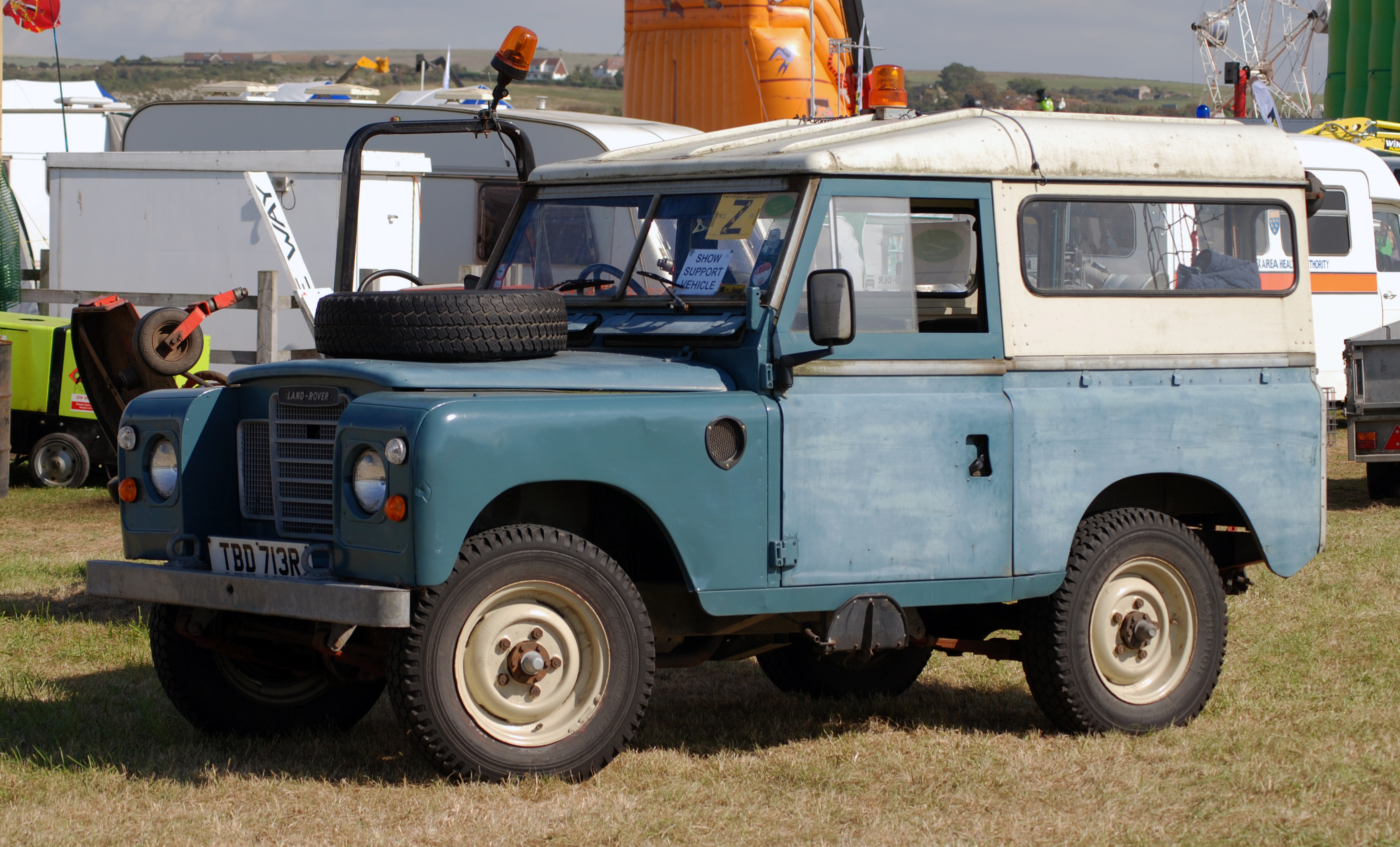 @Shoreham RAFA day 16/9/07